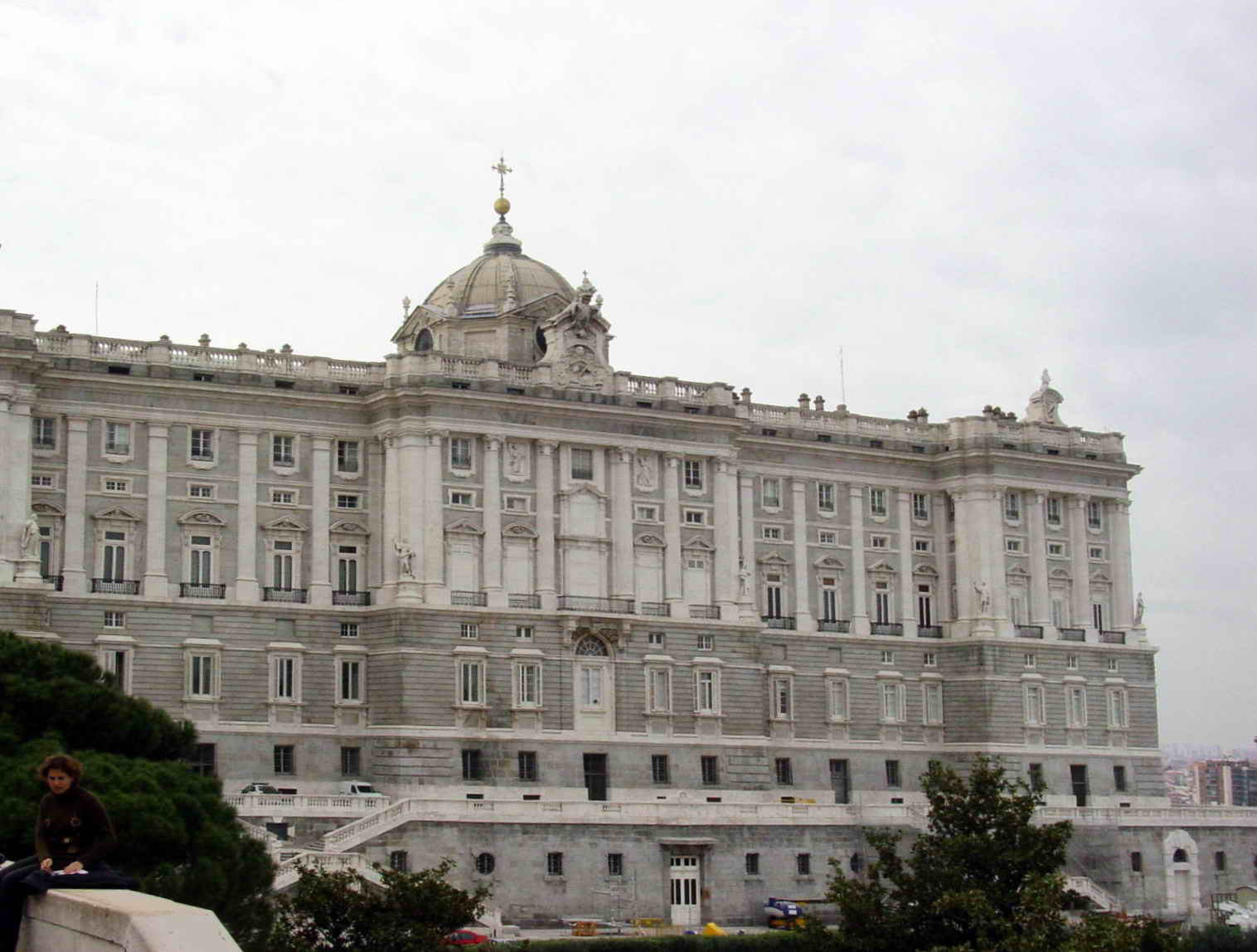 Palacio Real de Madrid - Spain